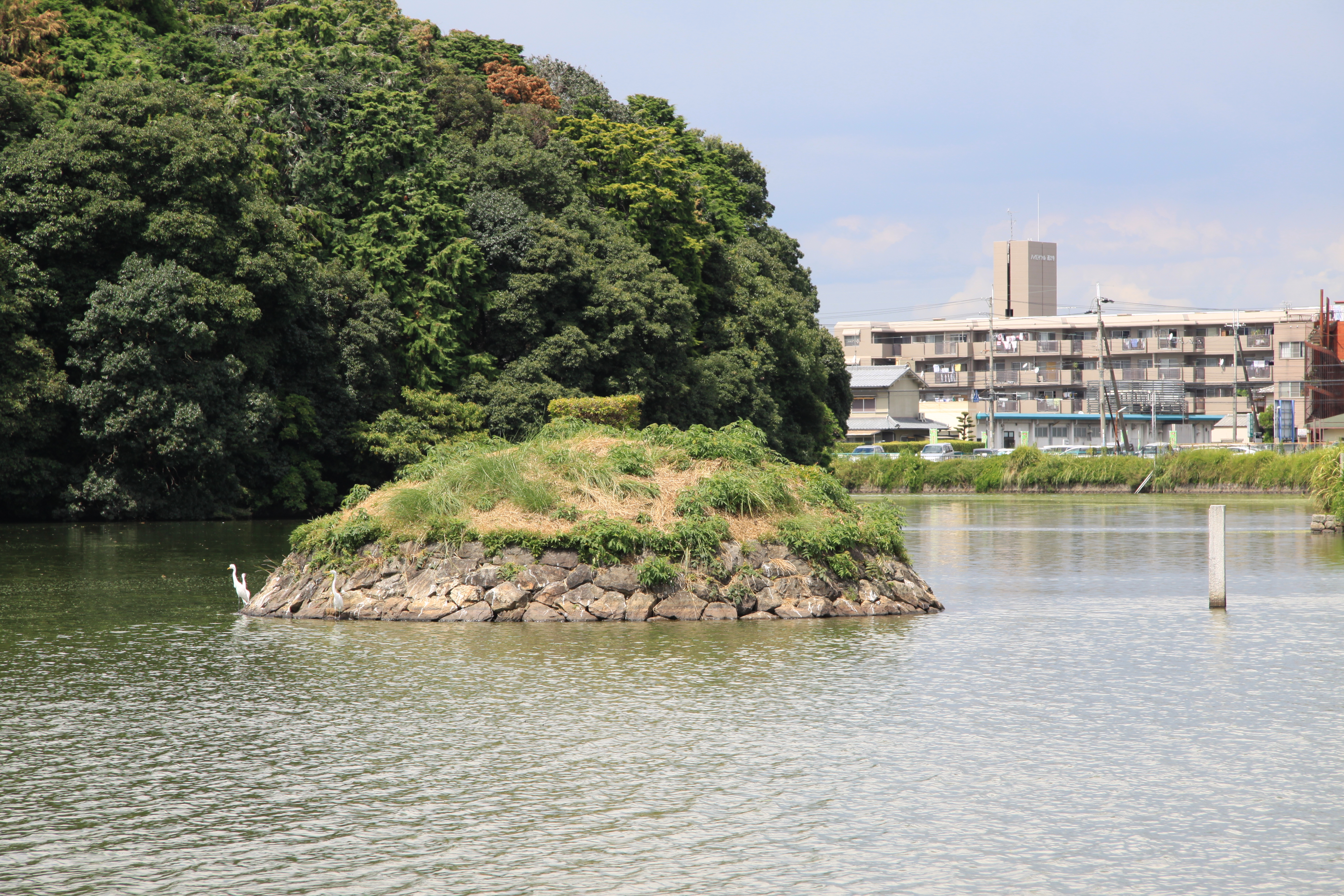 田道間守命塚